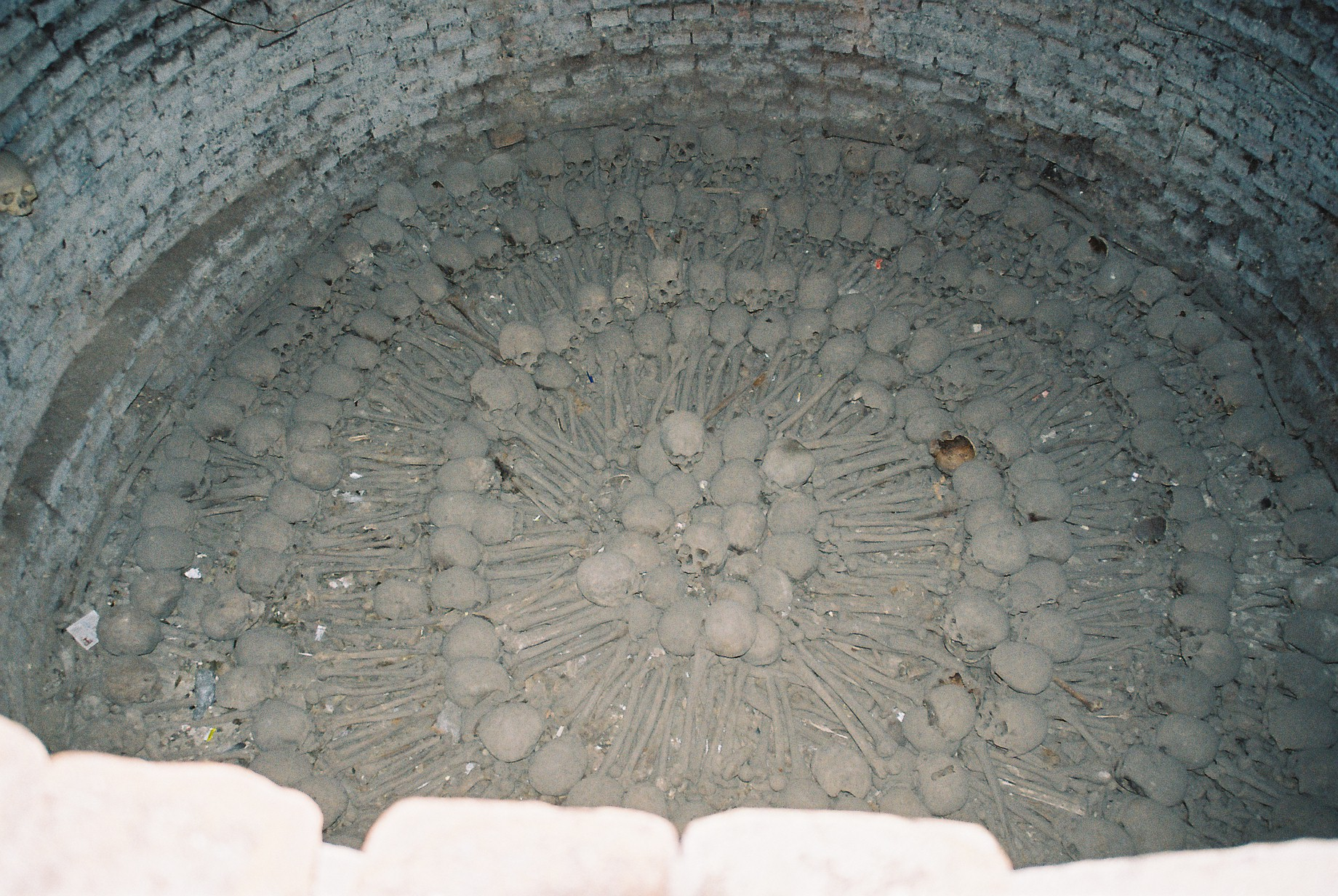 Catacombs of Convento de San Francisco in Lima